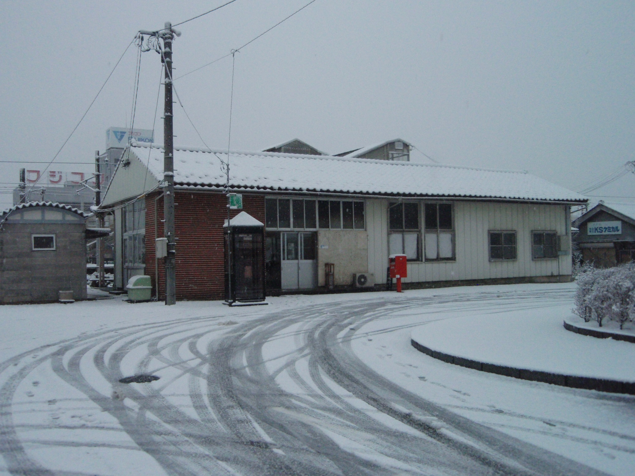 北鯖江駅(冬) 正面外観